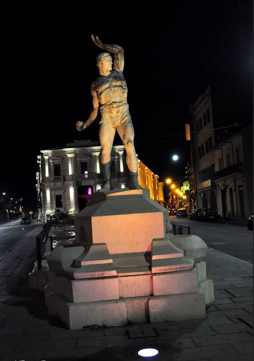 Prospettiva frontale del monumento del Balilla nel centro storico di Cosenza